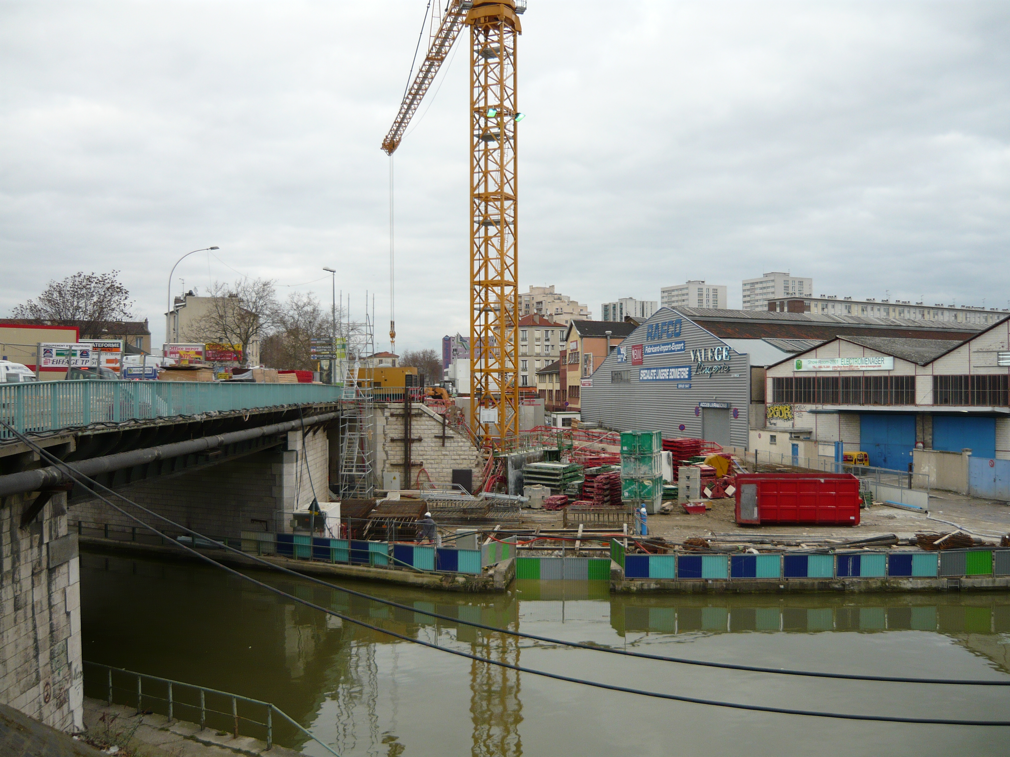 Chantier de métro au Pont de Stains en mars 2009